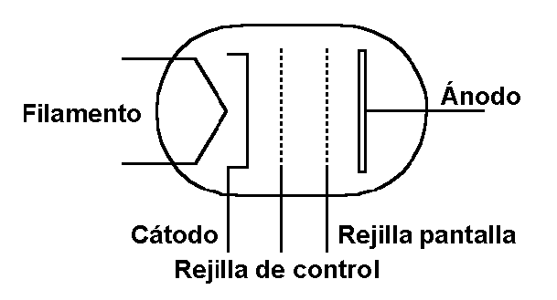 Símbolo del tetrodo